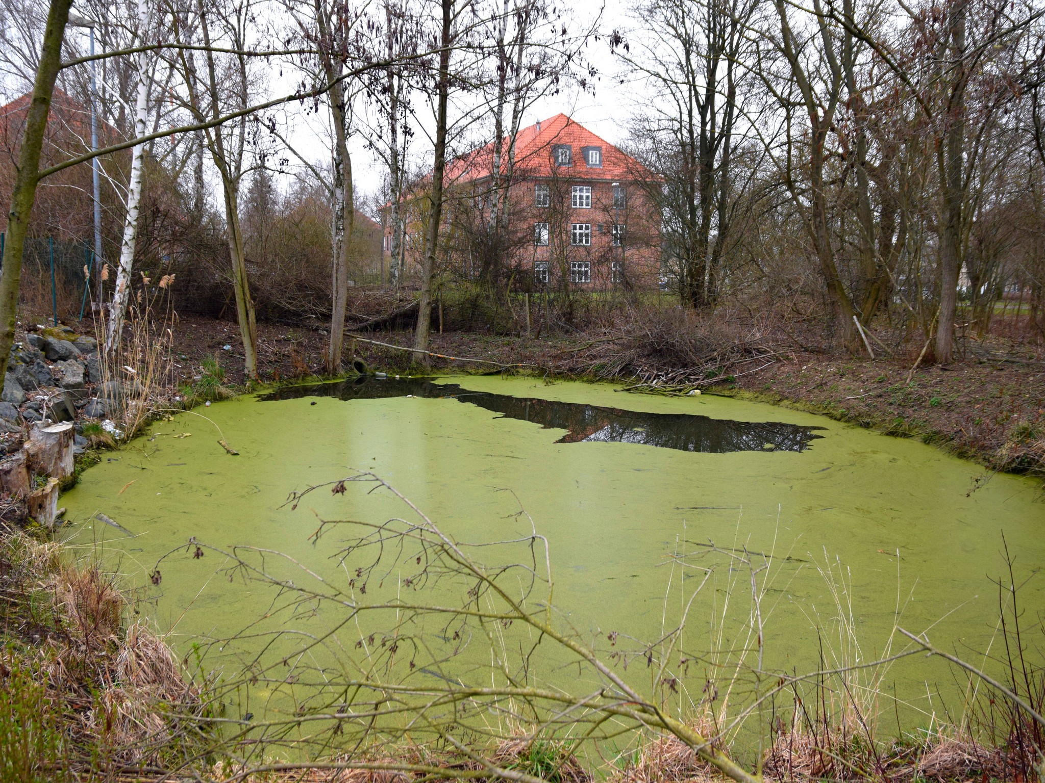 Teich an der Nuhnenstraße, Messering in Frankfurt (Oder)